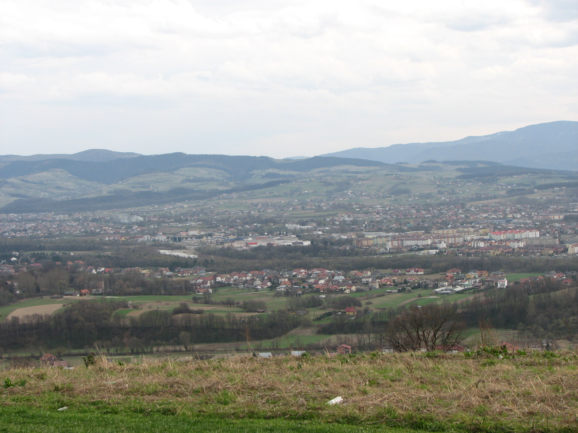 Szczyt Mużeń na Pogórzu Rożnowskim. Widok na Nowy Sącz.